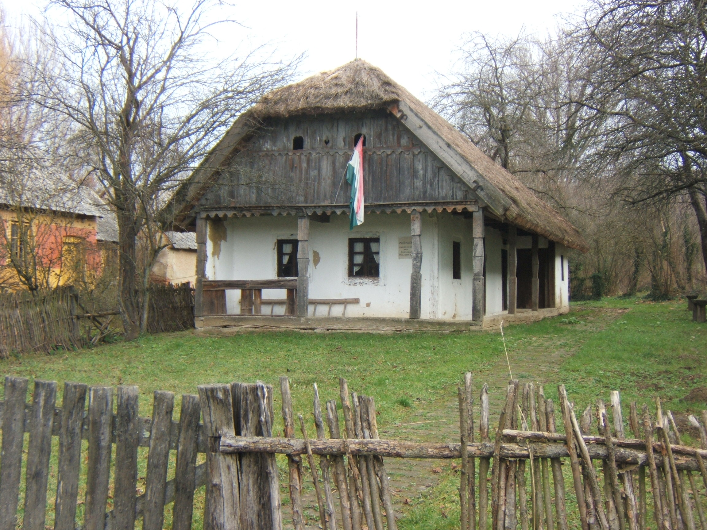 Zóka Lidi néni tájháza Szennán (Somogy megye)